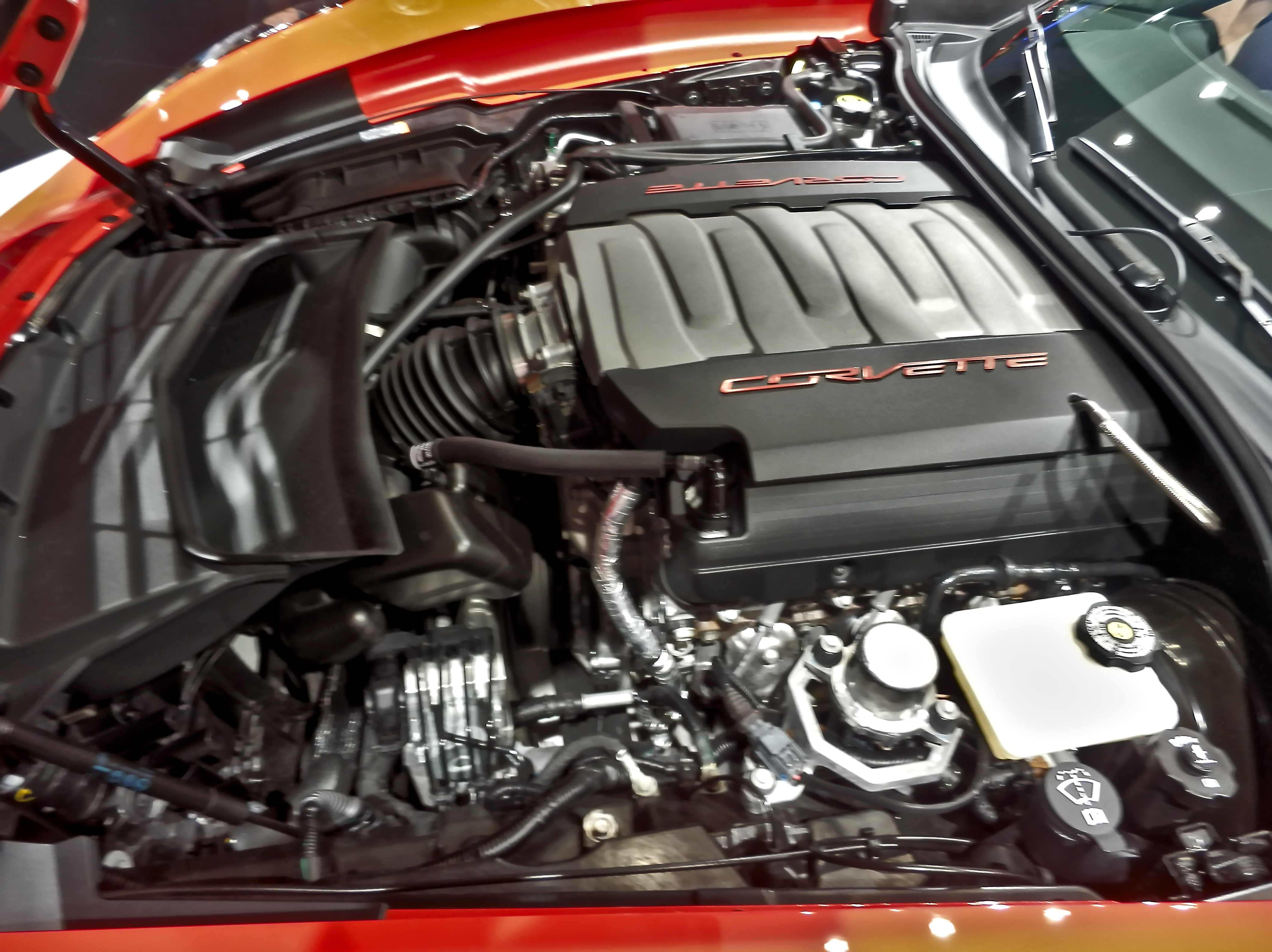 Chevrolet Corvette C7 Engine at IAA 2013